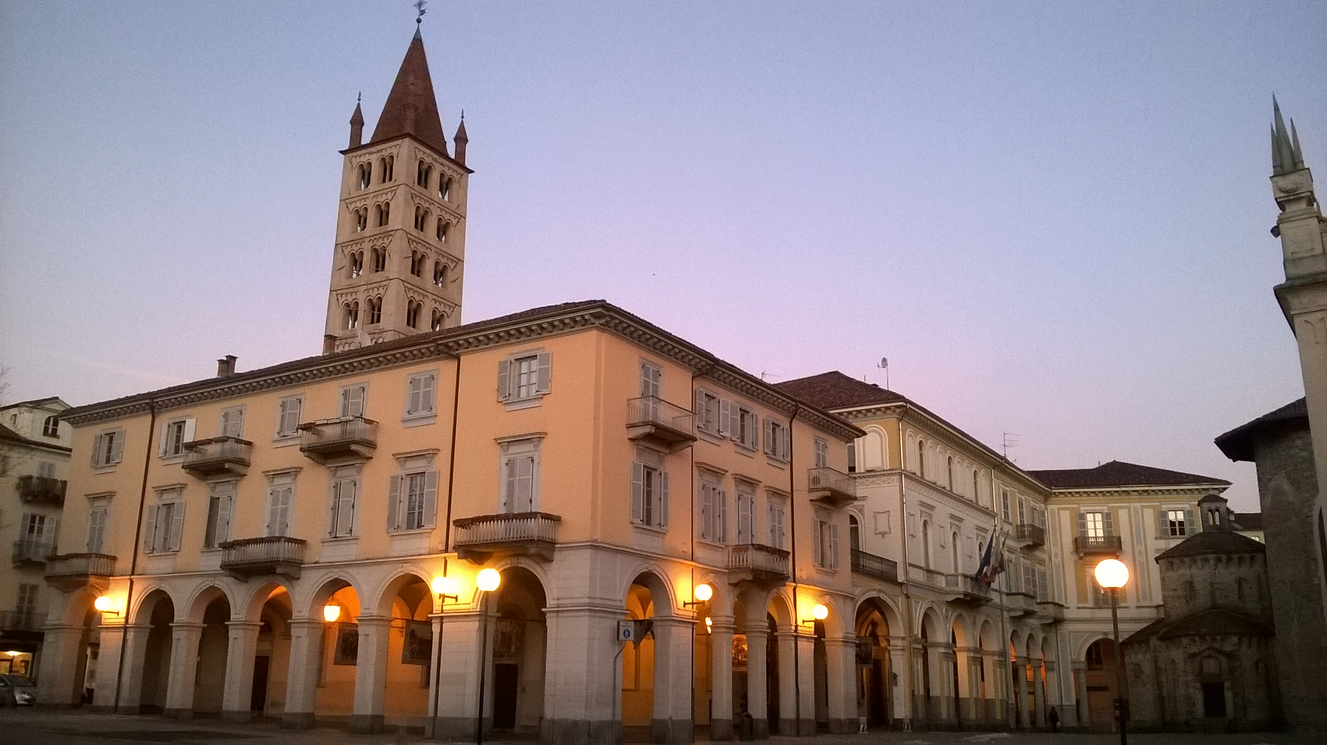 Veduta di piazza Duomo presso il rione Borgo di Biella